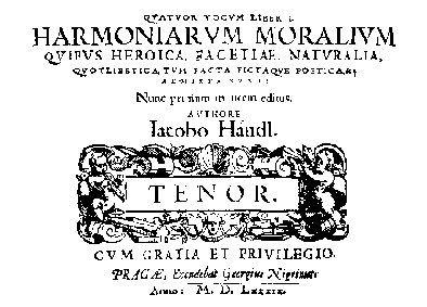 QVATVOR VOCVM LIBER I. HARMONIARVM MORALIUM QVIBUS HEROICA, FACETIAE, NATVRALIA, QVOTLIBETICA, TVM FACTA FICTAQVE POETICA, &c. ADMIXTA SVNT: Nunc primùm in lucem editus. AVTHORE Iacobo Hándl TENOR CVM GRATIA ET PRIVILEGIO. PRAGAE, Excudebat Georgius Nigrinus Anno: M. D. LXXXIX.